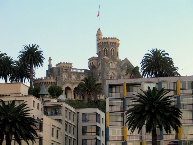 Castillo Brunet, Viña del Mar, Chile